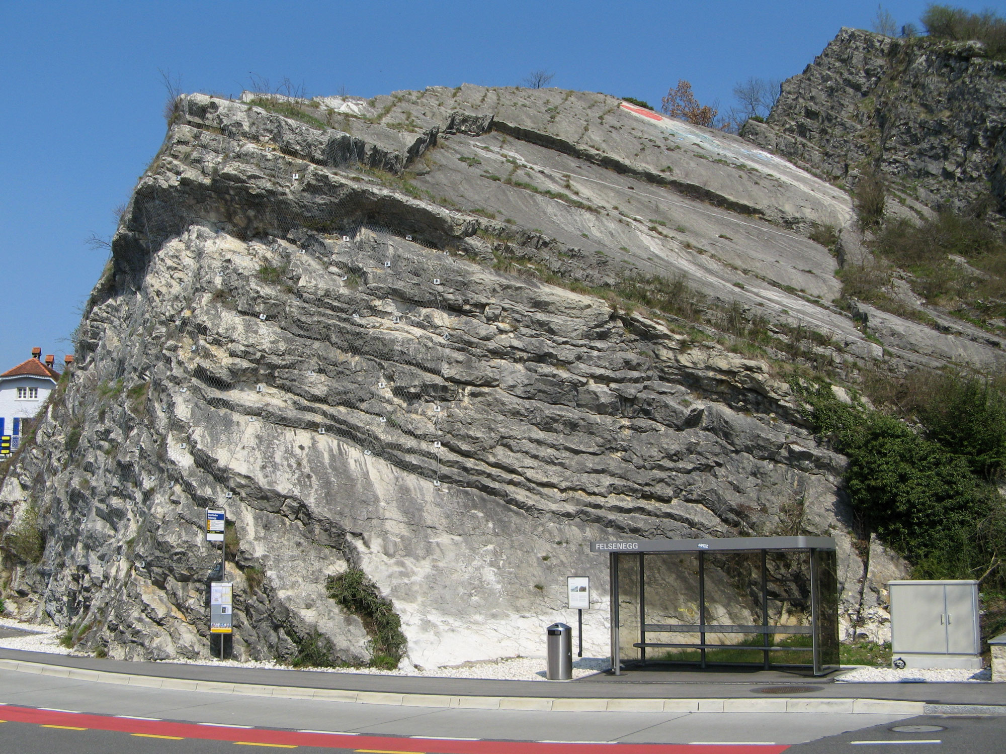 Felsabbruch an der Westspitze des Lägerngrates, in Baden in der Nähe des Landvogteischlosses